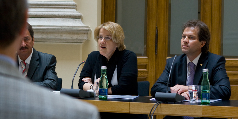 Ing. Kurt Gartlehner, SPÖ Dr. Ruperta Lichtenecker, Grüne Mag. Rainer Widmann, BZÖ fotografiert von karolariegler.at